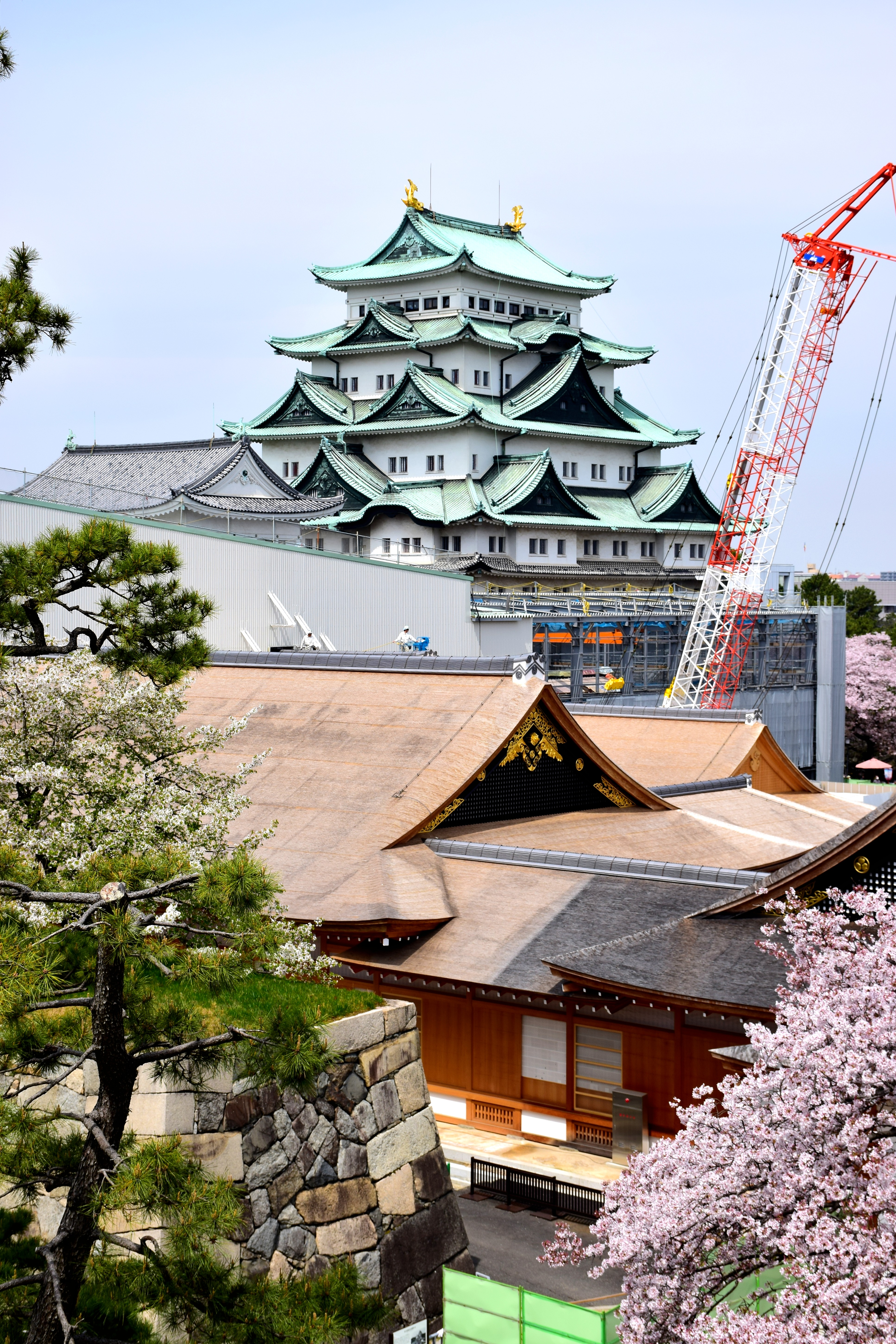 復元中の本丸御殿と天守